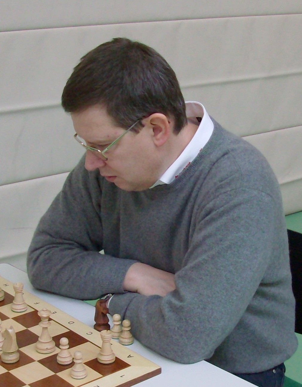 Mikhail Saltaev, chess grandmaster from Uzbekistan